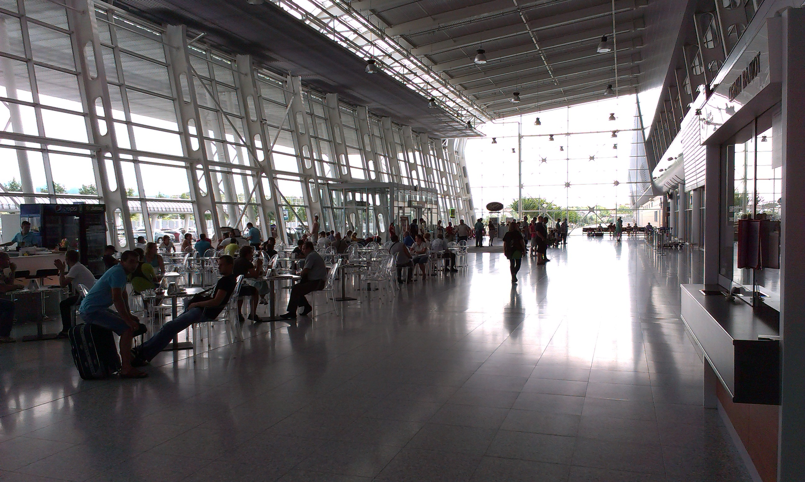 Flughafen Lemberg